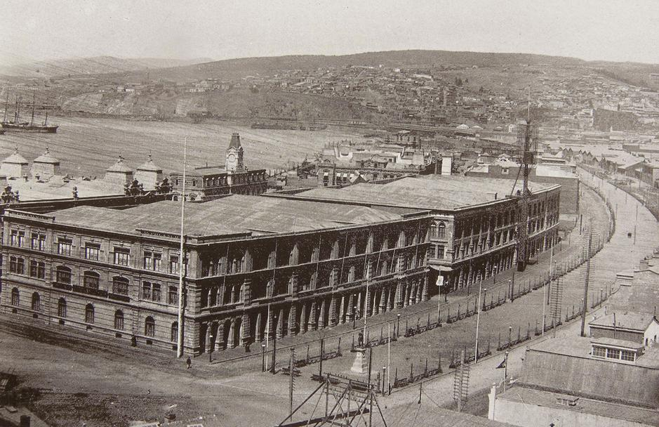 Gran Avenida en 1888 (actual avenida Brasil). Fotografía de Félix Leblanc.